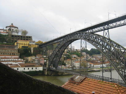 Dom Luis 1 bridge, Porto, Portugal